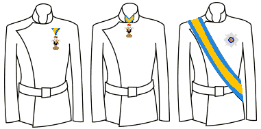 Modo di indossare le decorazioni dell'Ordine Imperiale della Corona Ferrea (Impero Austriaco)